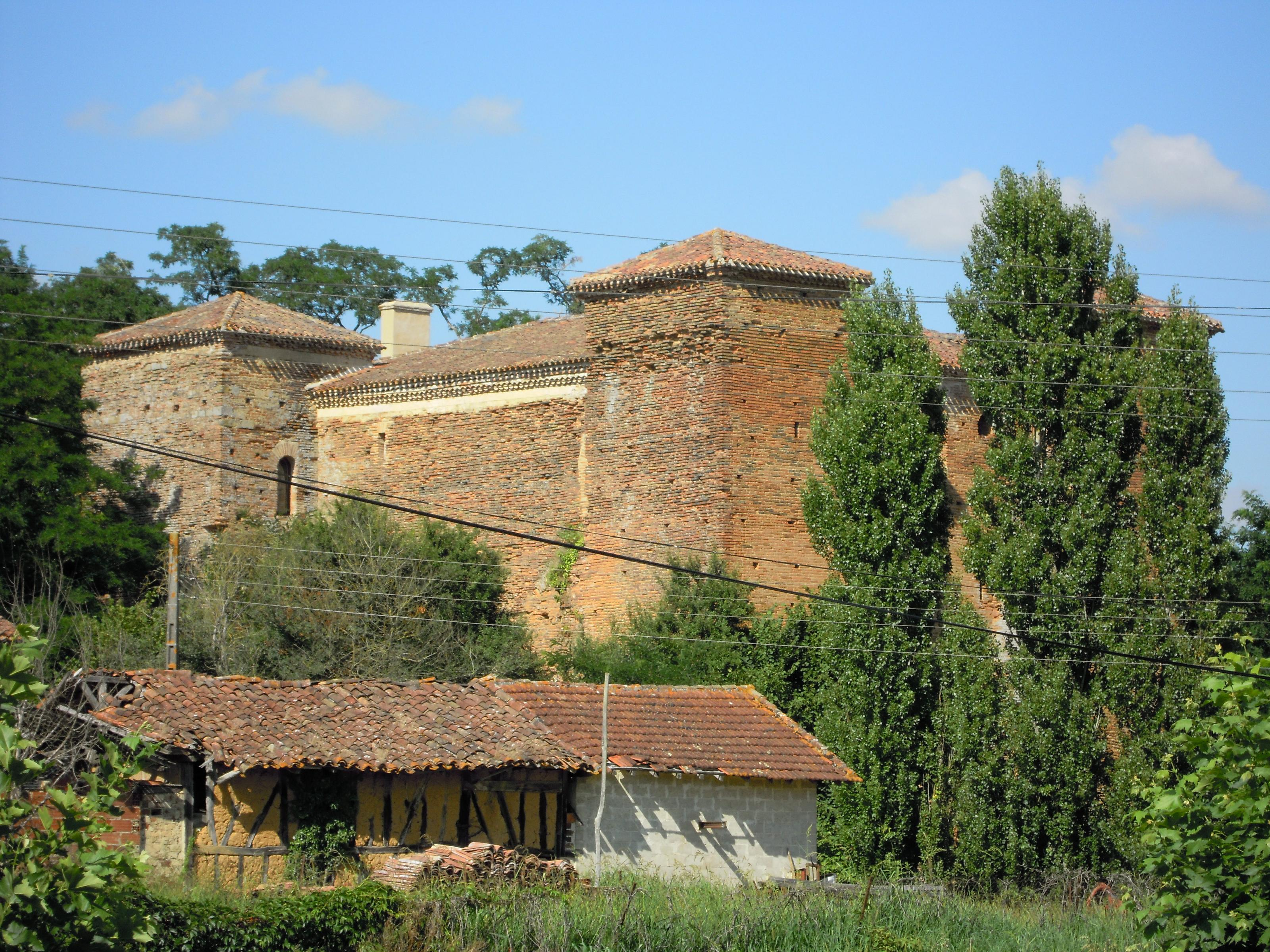 Photo du château d'Espas prise en juillet 2010.